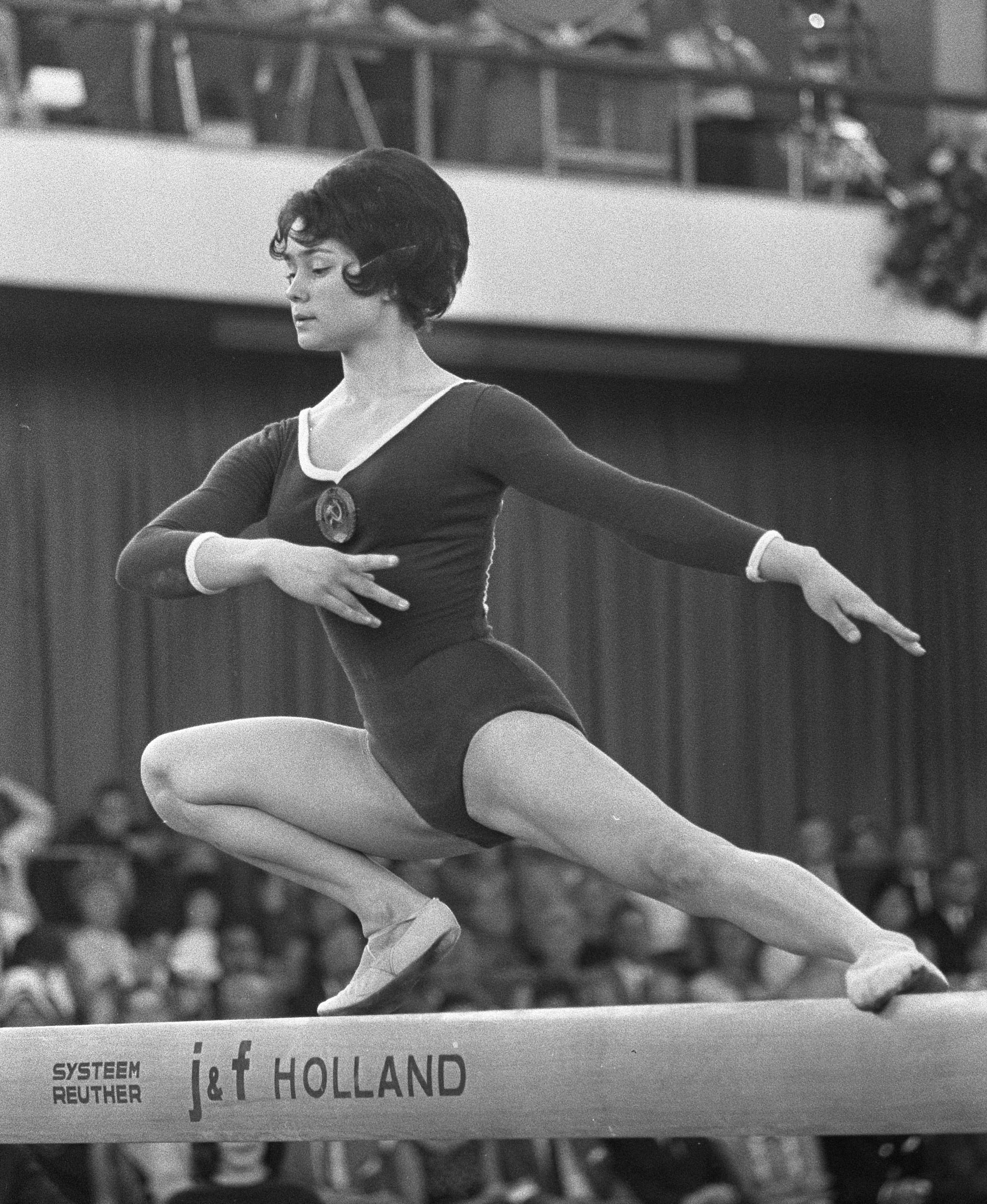 Zinaida Voronina at the European Championships